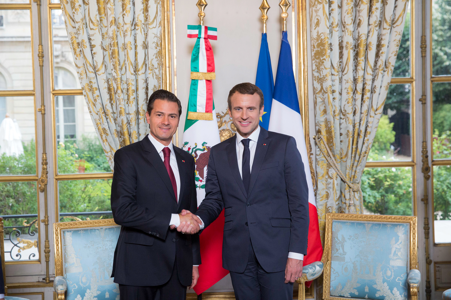 El Presidente Enrique Peña Nieto se encuentra en París, en donde se reunirá con el Presidente Emmanuel Macron, con el objetivo de fortalecer la relación entre México y Francia.